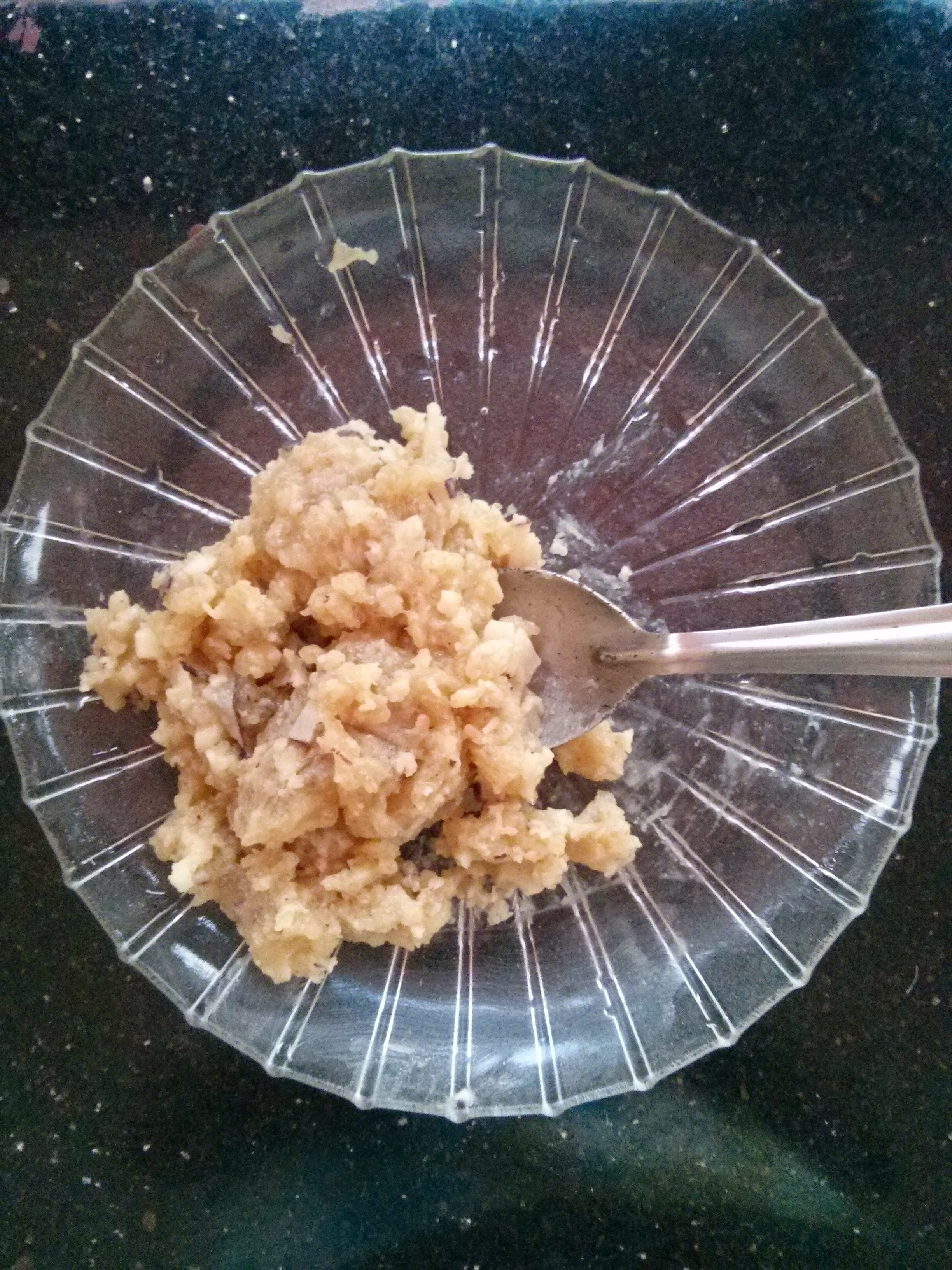 പനനൂറ് കുറുക്കിയത്